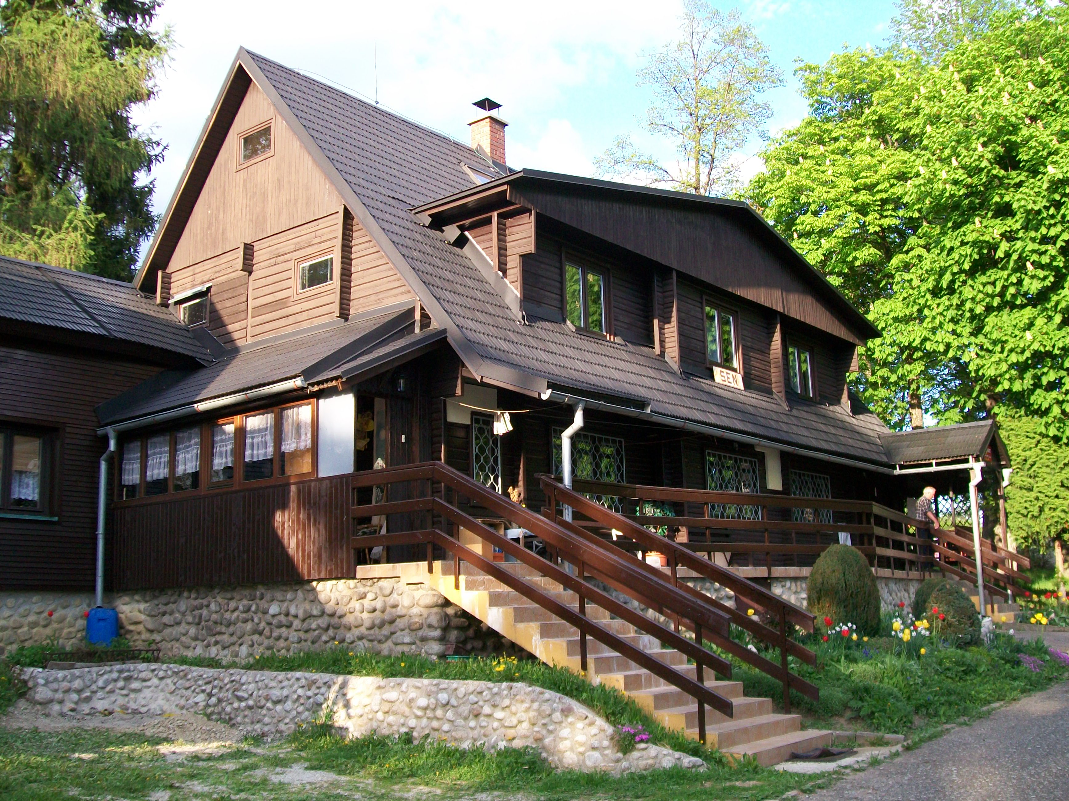 Chata Sen v Tatranskej Štrbe